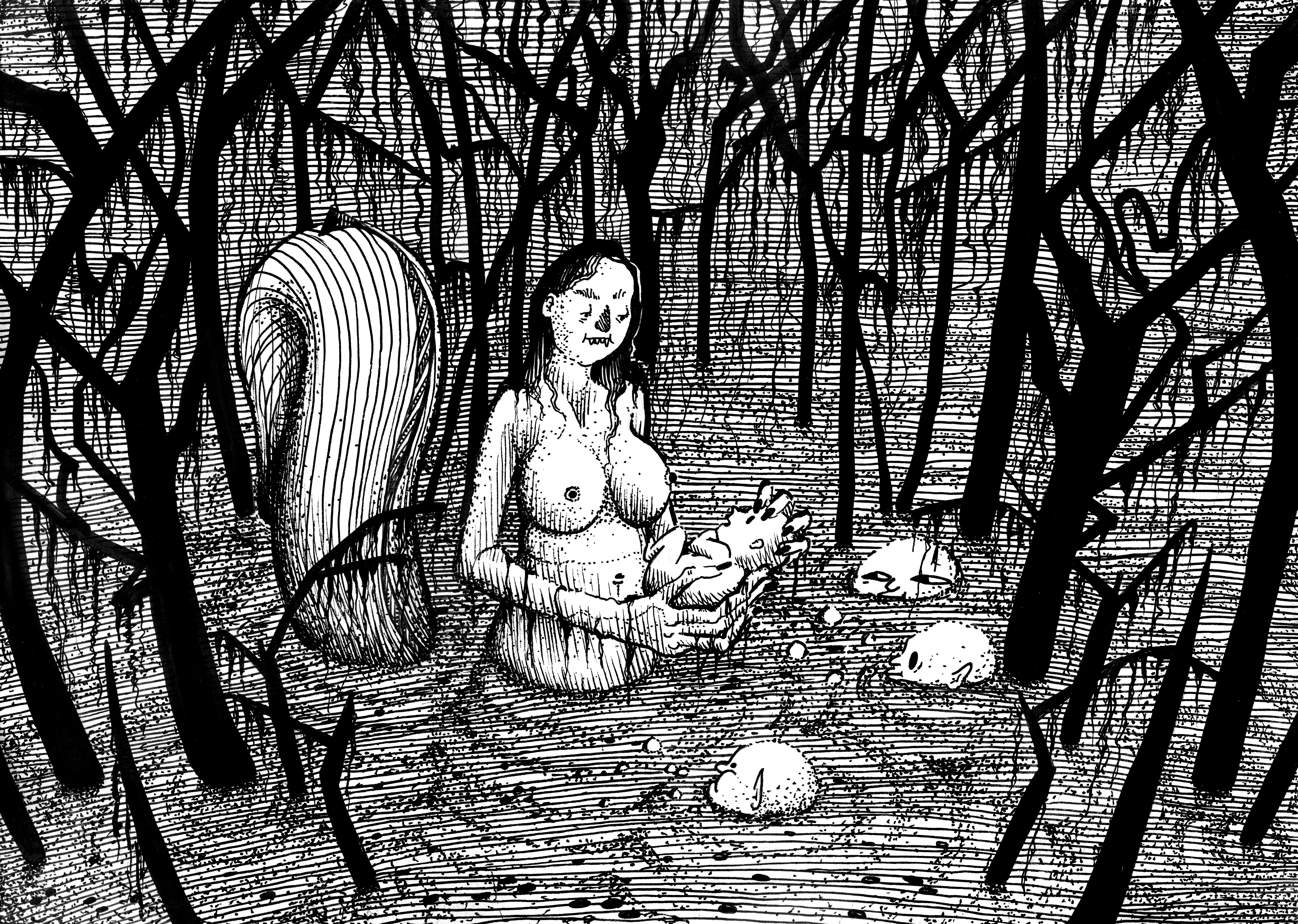 Grafika Marii Apoleiki przedstawiająca bogienki – istoty z polskiej ludowej demonologii. Grafika ilustruje tekst Oskara Kolberga o bogienkach z pracy Lud [...] Krakowskie, cz. 3, Kraków 1874